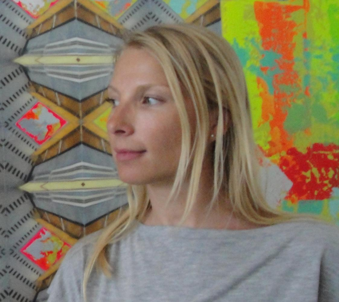 Kunstner Sara Mathilde Øster foran et af hendes værker.